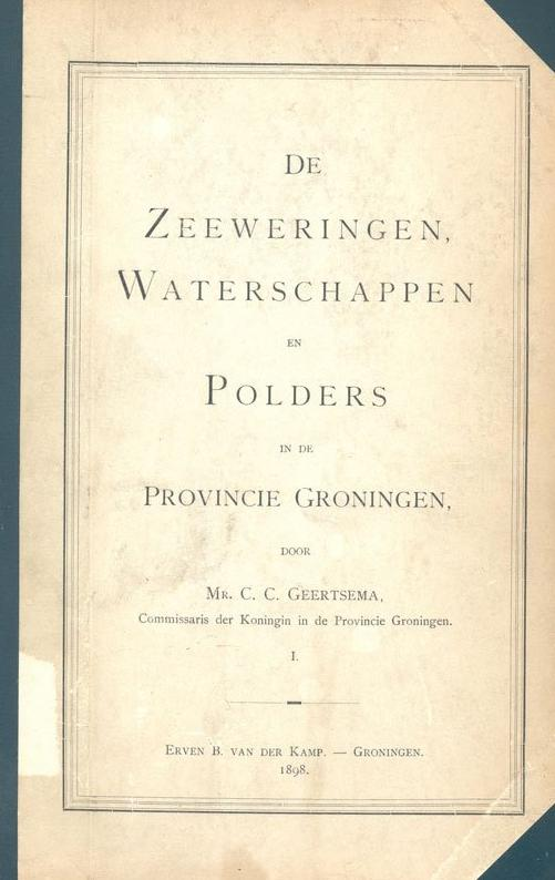 Voorzijde "De_zeeweringen,_waterschappen_en_polders_in_de_provincie_Groningen" (1898; 2e. dr.: 1910).